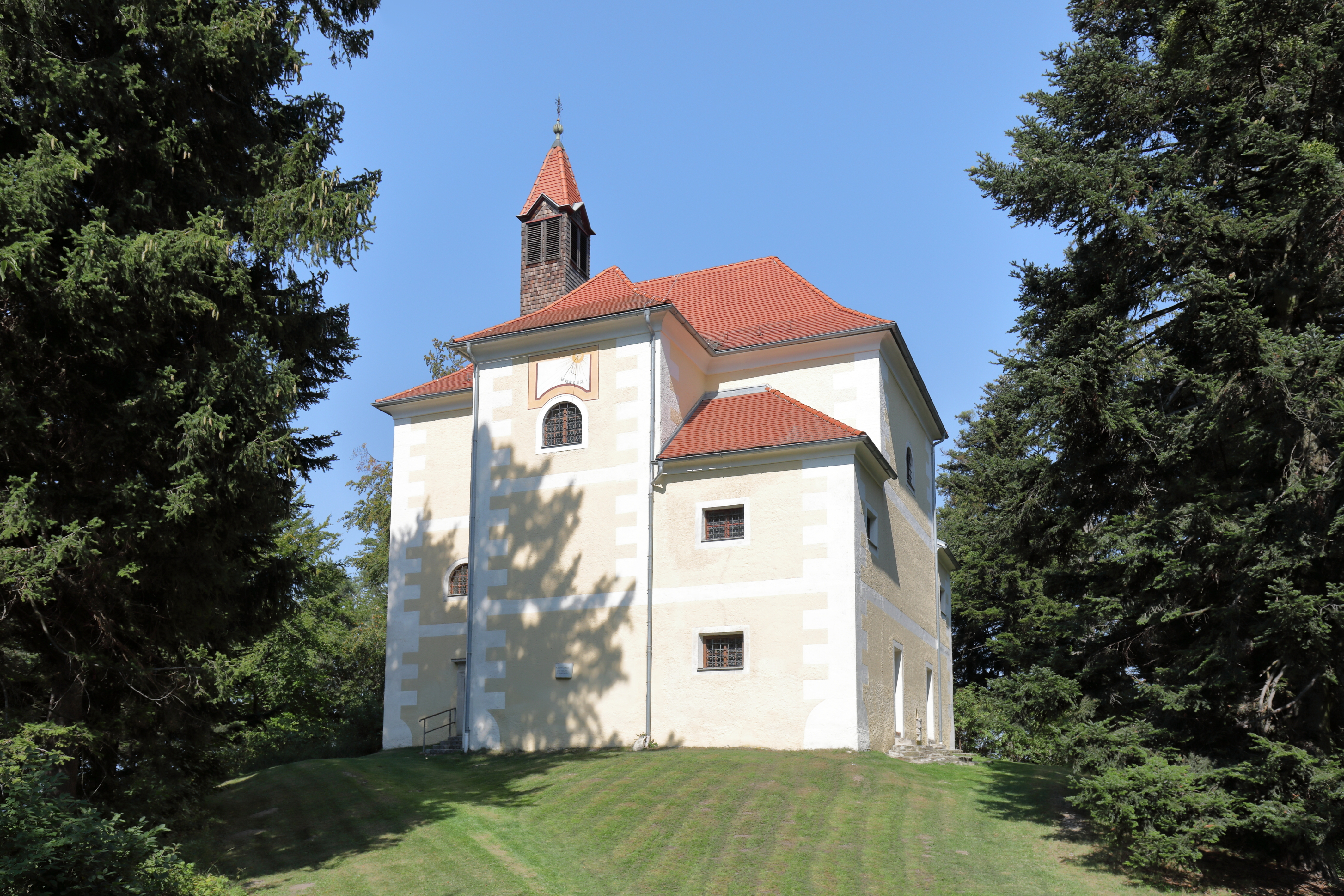 Die Rosalienkapelle am Gipfel des 748 m hohen Heubergs, auch Rosalia bezeichnet, in der burgenländischen Gemeinde Forchtenstein. Den kreuzförmigen Sakralbau stiftete 1670 Graf Paul Esterhazy.